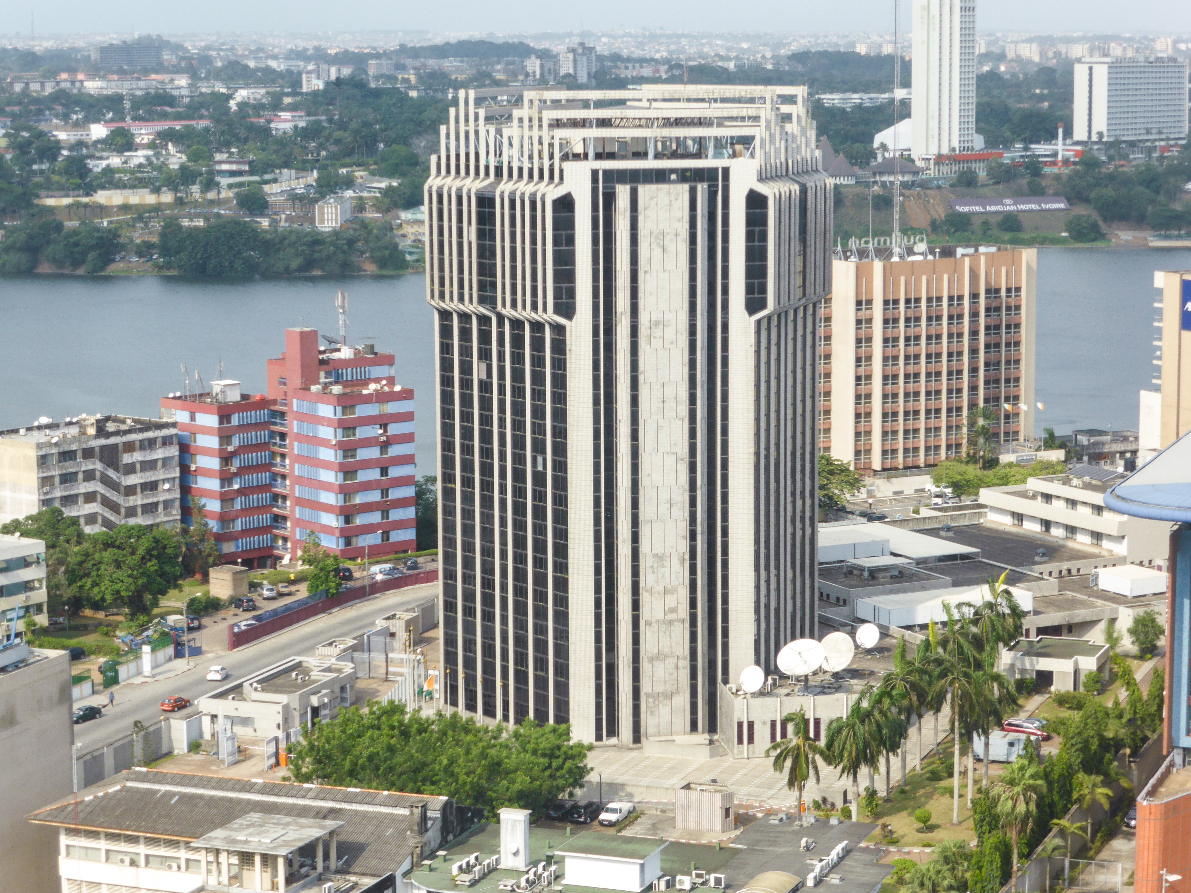 L'agence de la BCEAO à Abidjan